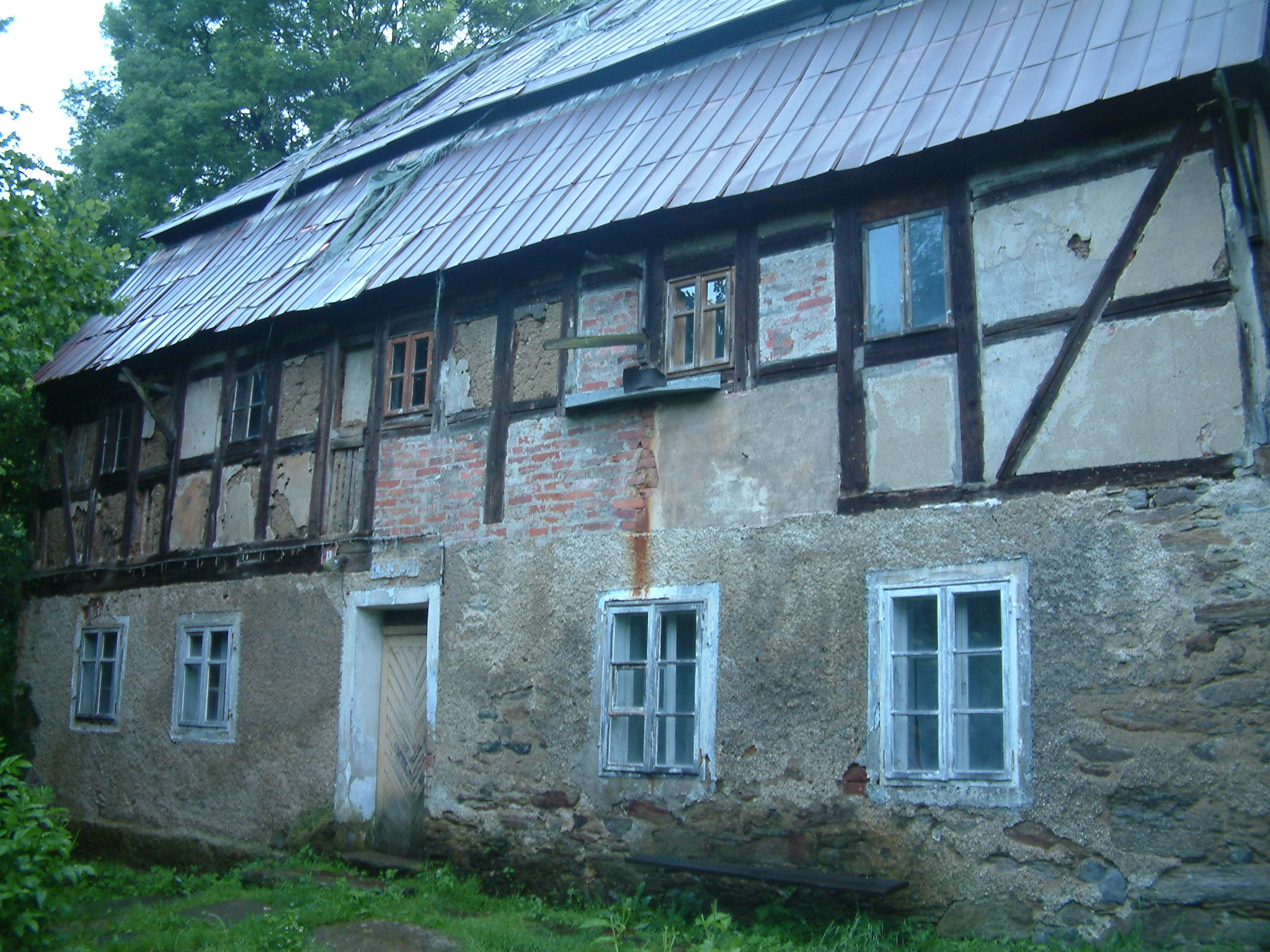 Horní Hrad 11.7.2004